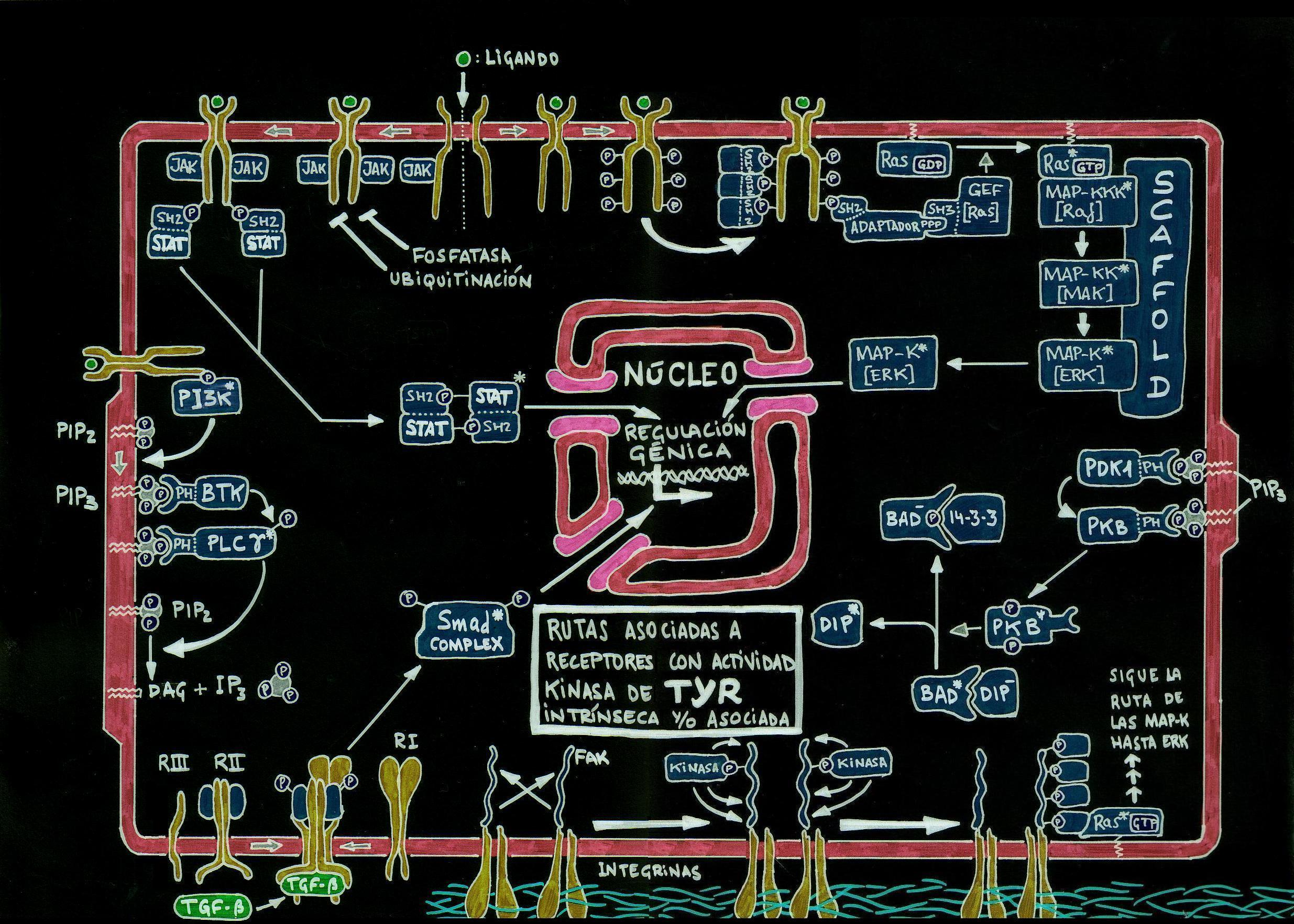 Esquema genérico de las rutas de transmisión de señales dependientes de receptores con actividad kinasa de tirosina